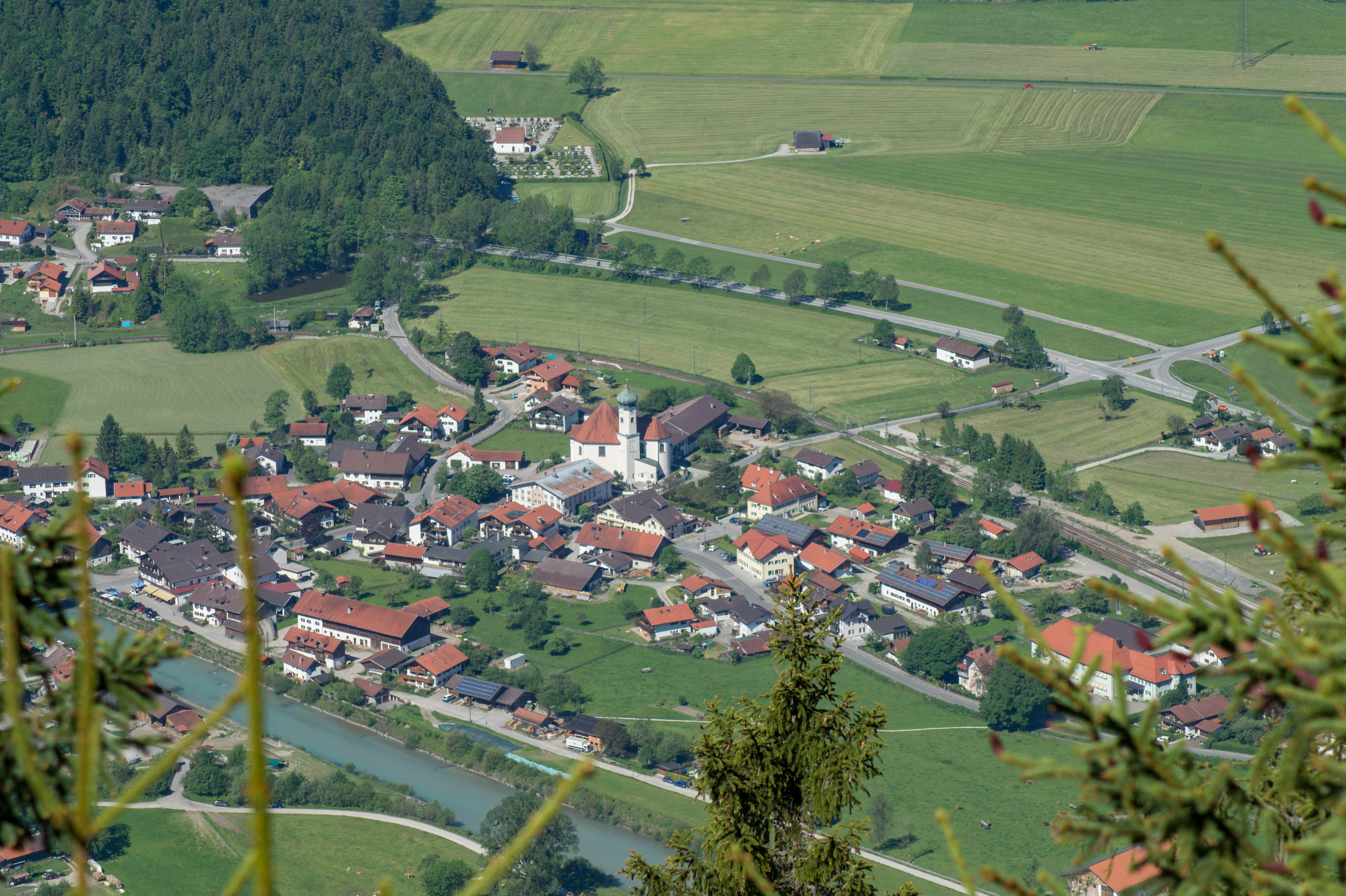 Blick von der Osterfeuerspitze auf Eschenlohe.